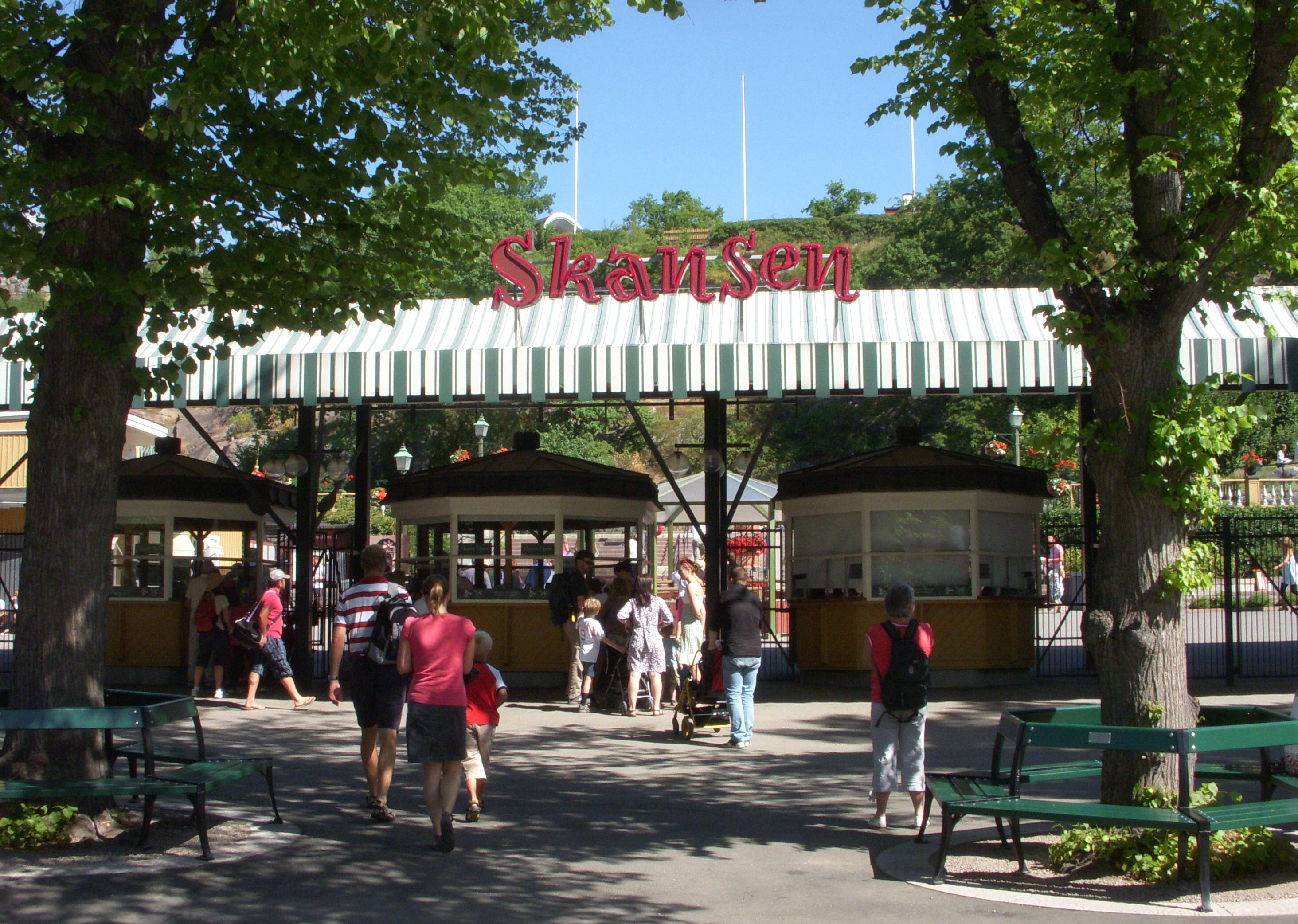 Skansens huvudentré från Djurgårdsvägen